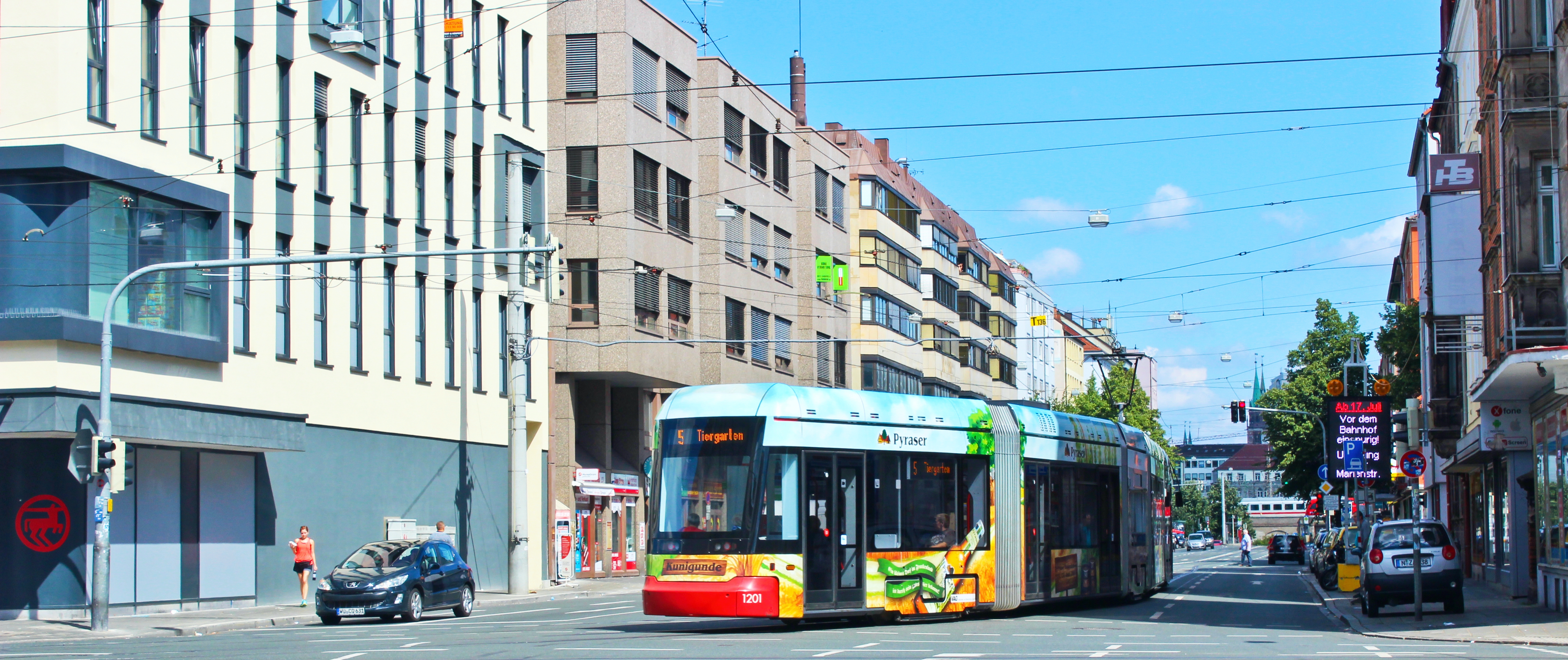 Kreuzung Pillenreuther Straße/Wölckernstraße mit Straßenbahn in Nürnberg